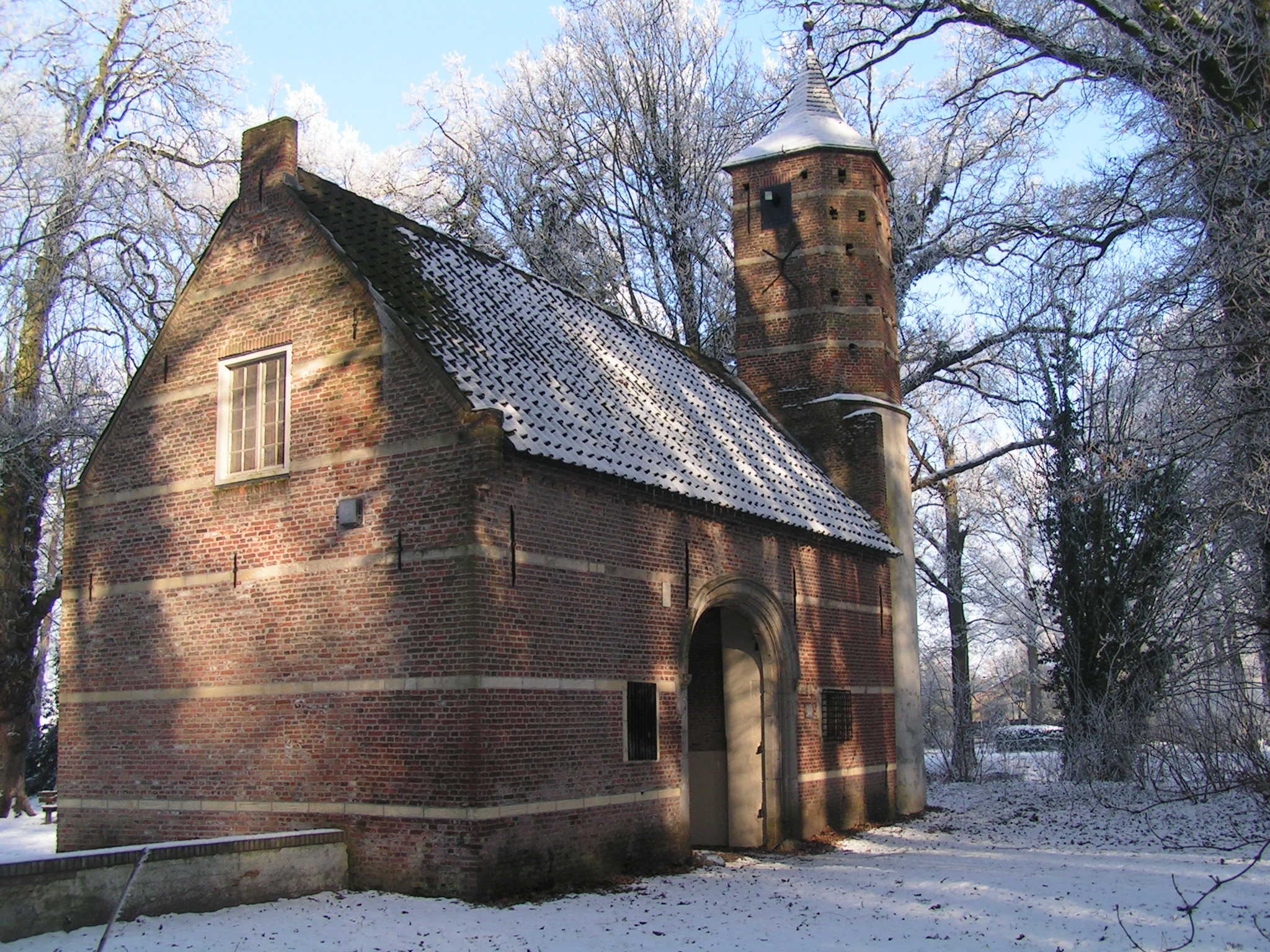 Poortgebouw voormalig kasteel Selden sate